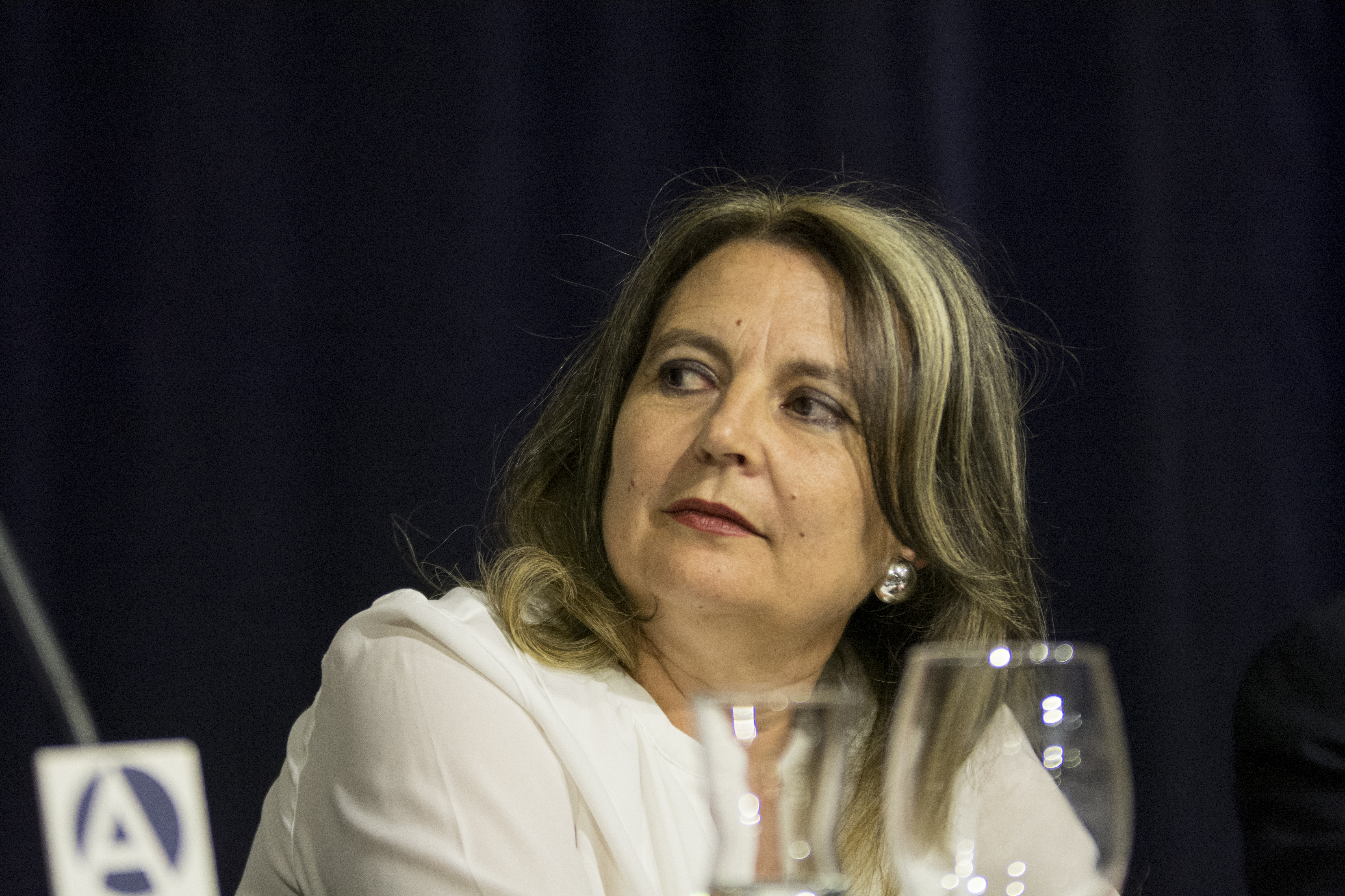 María Elvira Roca Barea, doctora en Filología. Autora de Imperofobia y La leyenda negra, durante la mesa redonda La huella española en los Estados Unidos. Aproximaciones a una historia común organizada por Casa de América en 2017.